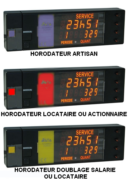 TYPE HORODATEUR TAXIS PARISIENS